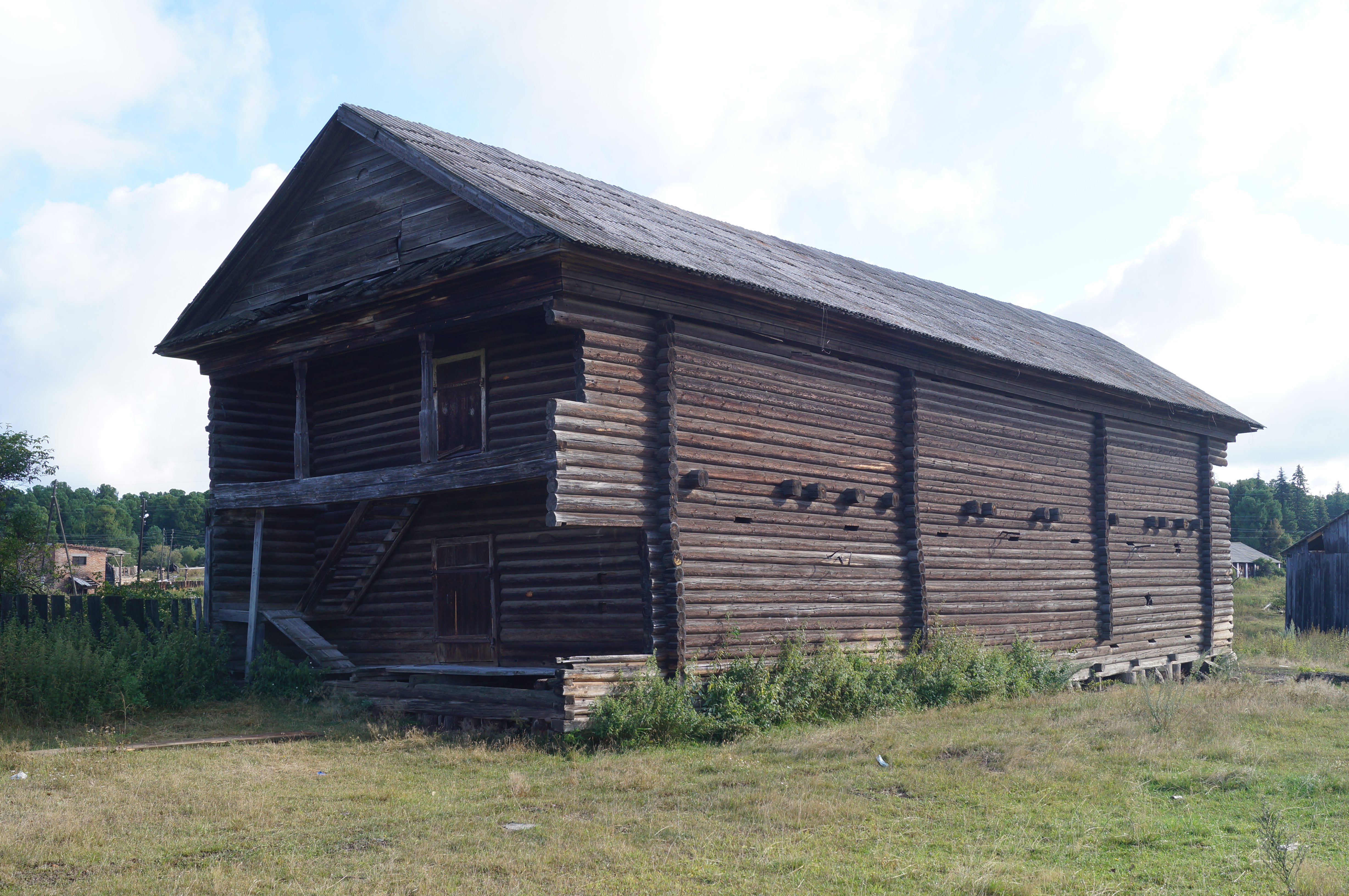 Деревянный амбар: Вороковка, Курагинский район, Красноярский край